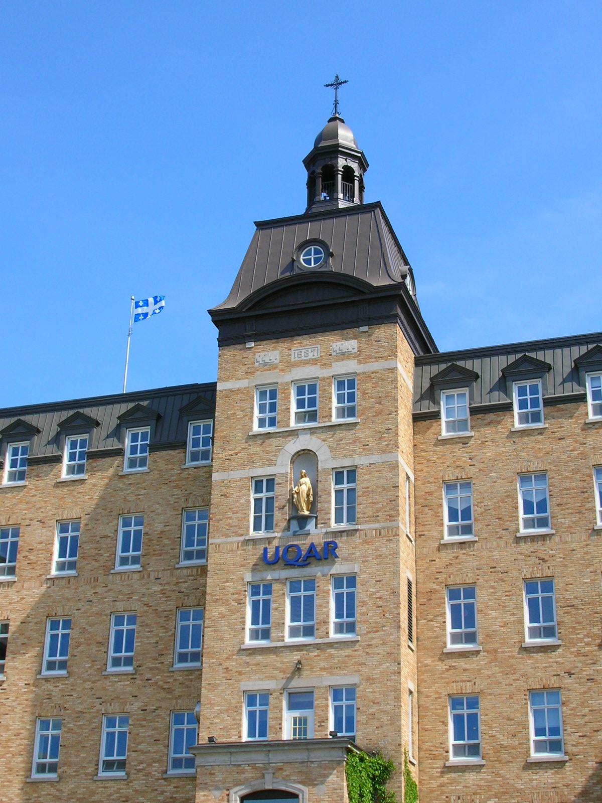 Facade de l'UQAR, campus de Rimouski.